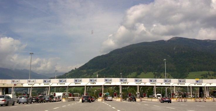 Anfahrt der Mautstelle Sterzing aus Richtung Süden